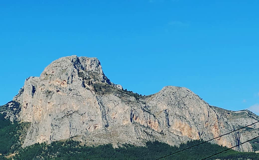 El Ponoig vist des de La Nucia.